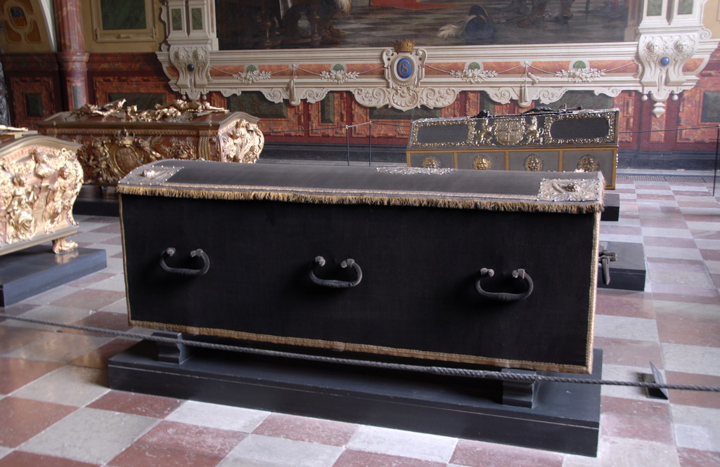 Grave of Queen Anna Cathrine of Brandenburg Zeer oude kist (in gebruik) in kapel van Christiaan IV. Christians hofarchitecten, de gebroeders Laurens en Hans van Steenwinkel, kwamen in 1620 met hun werk gereed; het interieur is echter 19e eeuws. De grote schilderijen met taferelen uit het leven van de koning zijn van Marstrand; de trompe-l'euil lijsten werden gemaakt door H. Hansen. Rondom zijn aan de wand portretten geplaatst van tijdgenoten van Christian. De vijf sarcofagen markeren de laatste rustplaats van Anne Catherine, Christian IV , kroonprins Christian, Sofie Amalie en Frederik III.